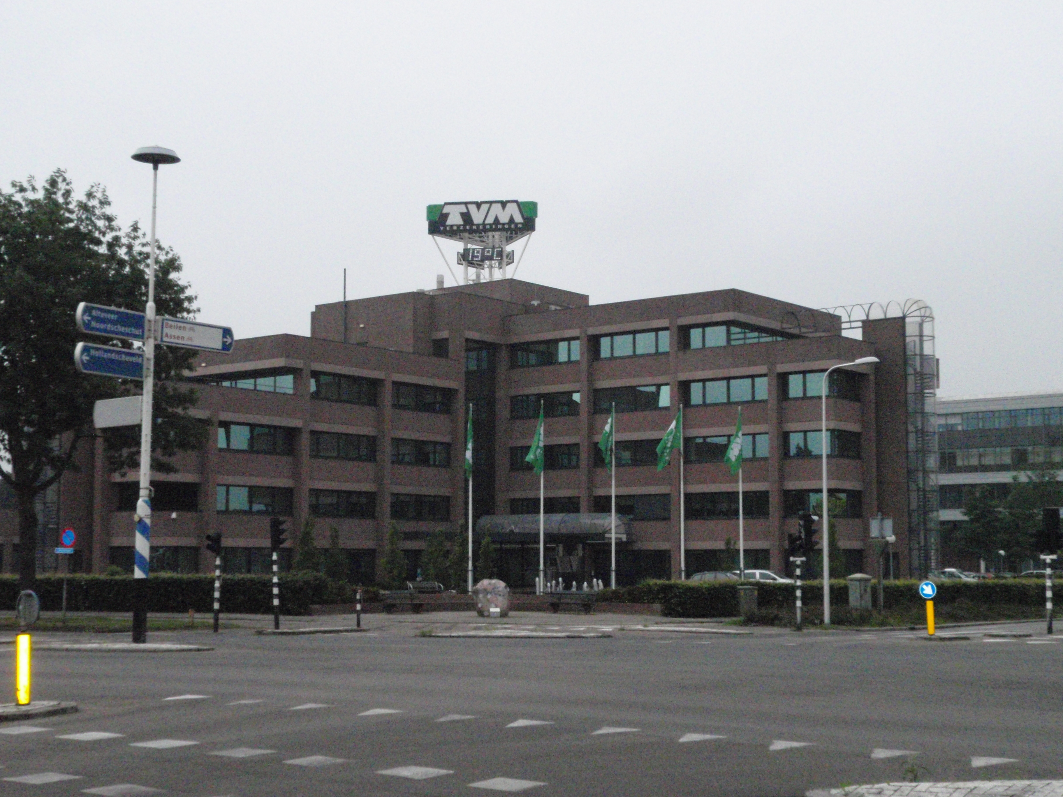 Hoofdkantoor TVM te Hoogeveen d.d. 4 juni 2008